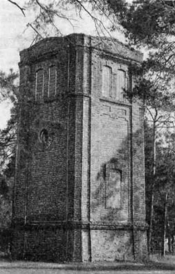 Беларуская (тарашкевіца): Урэчча (Urečča). Вадацяжная вежа пры чыгуначнай станцыі